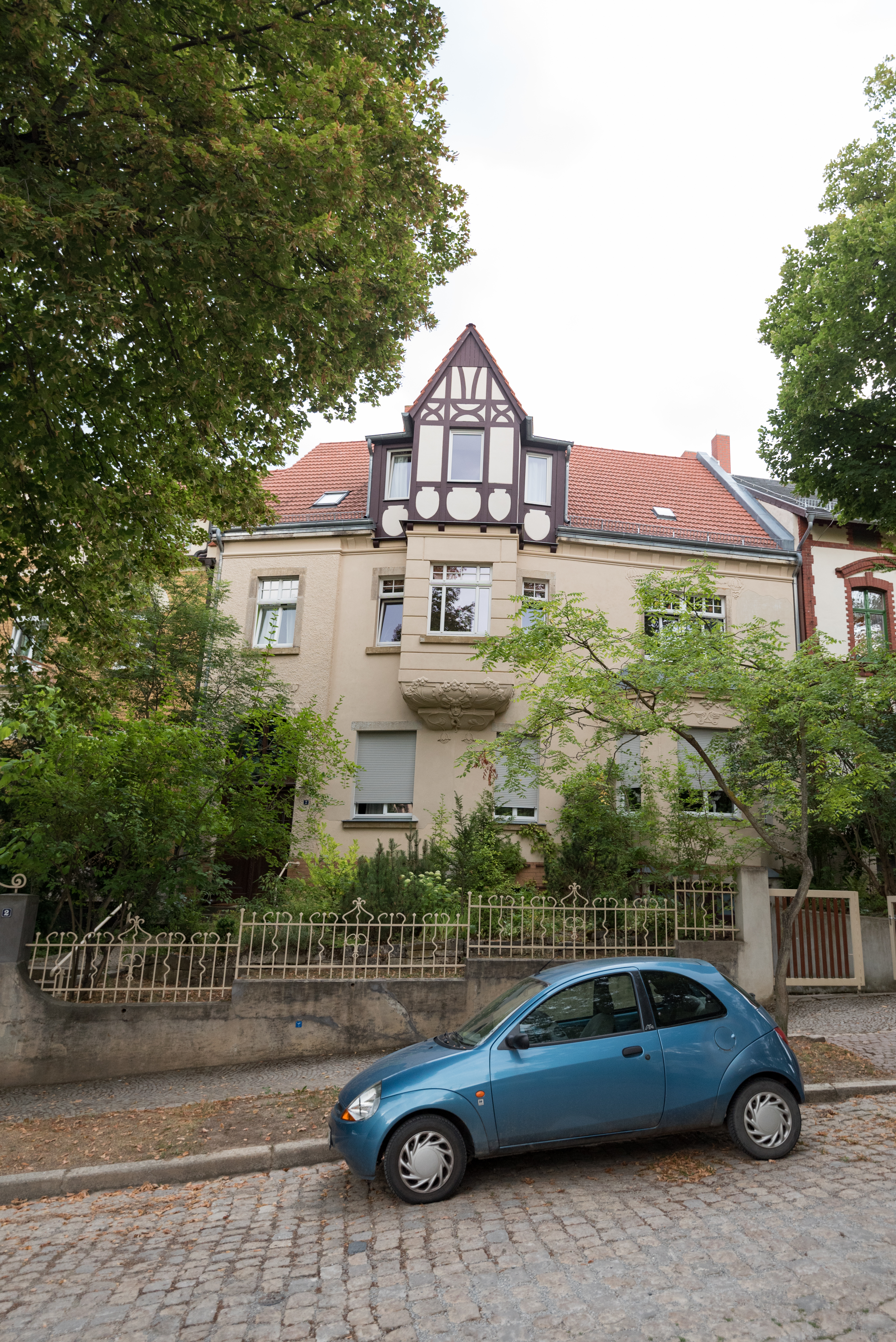 Naumburg (Saale), Kirschberg 2